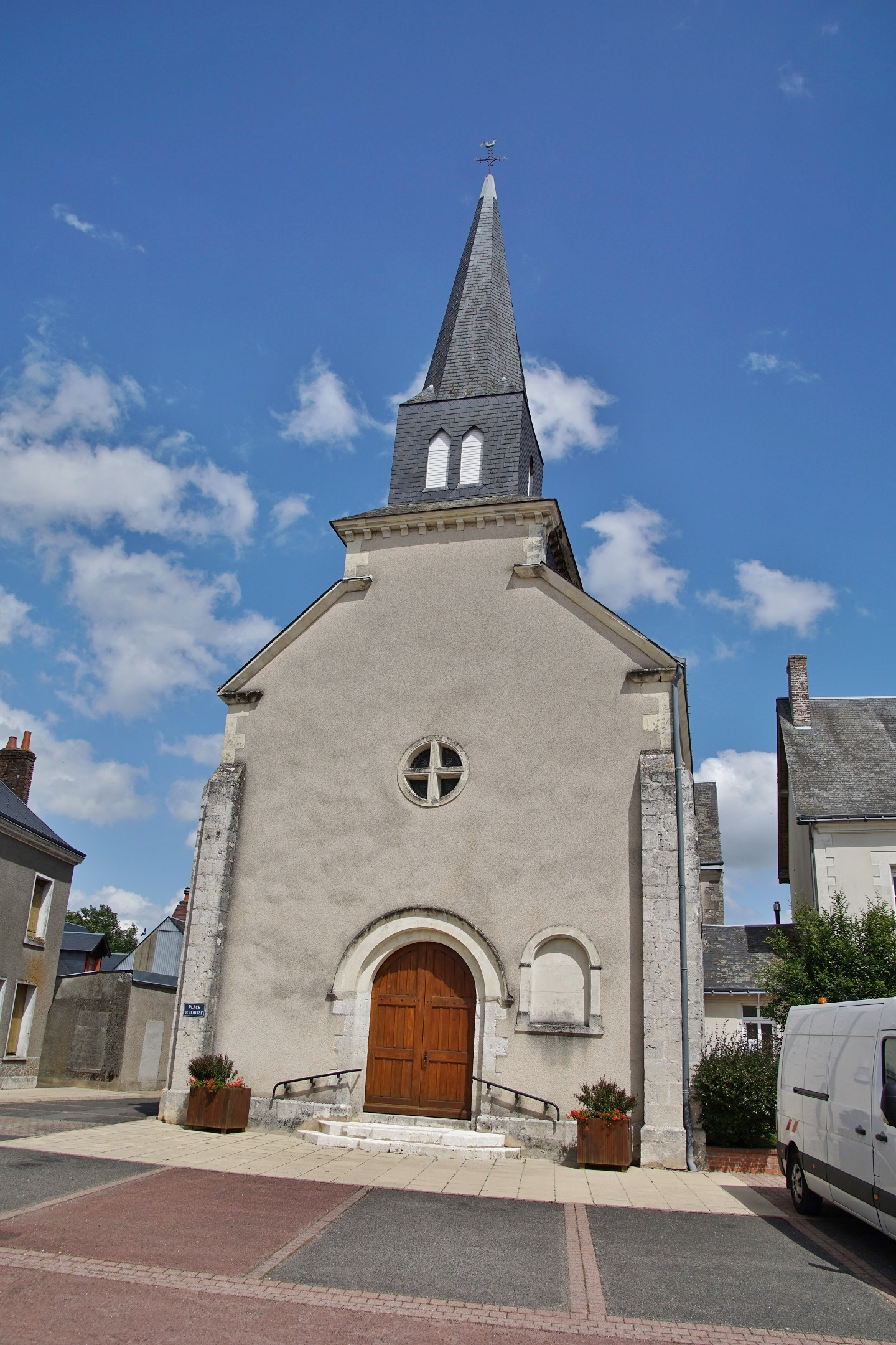 Loir et Cher